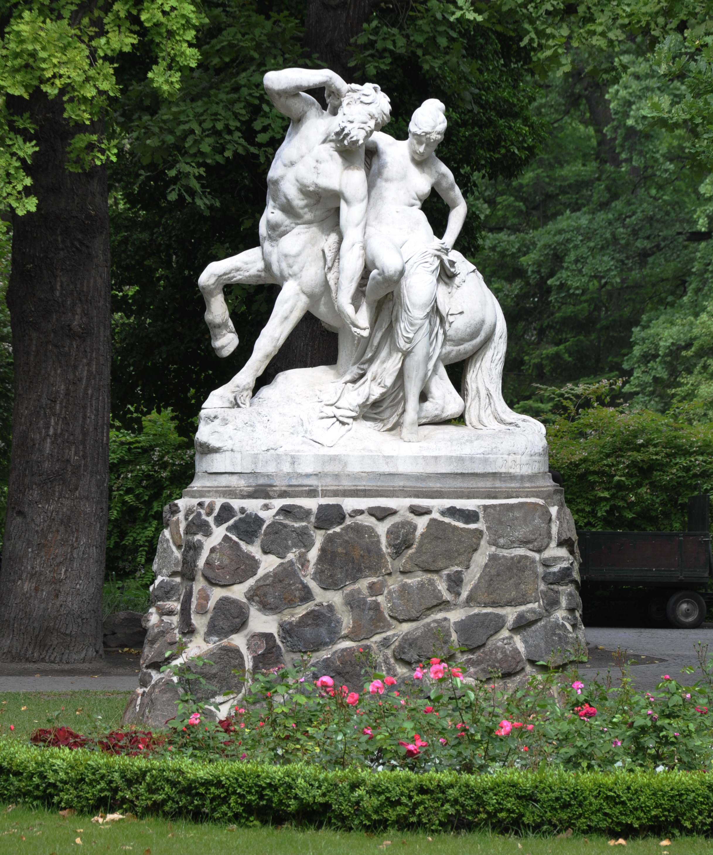 Reinhold Begas, Kentaur und Nymphe, 1901, Zoologischer Garten Berlin